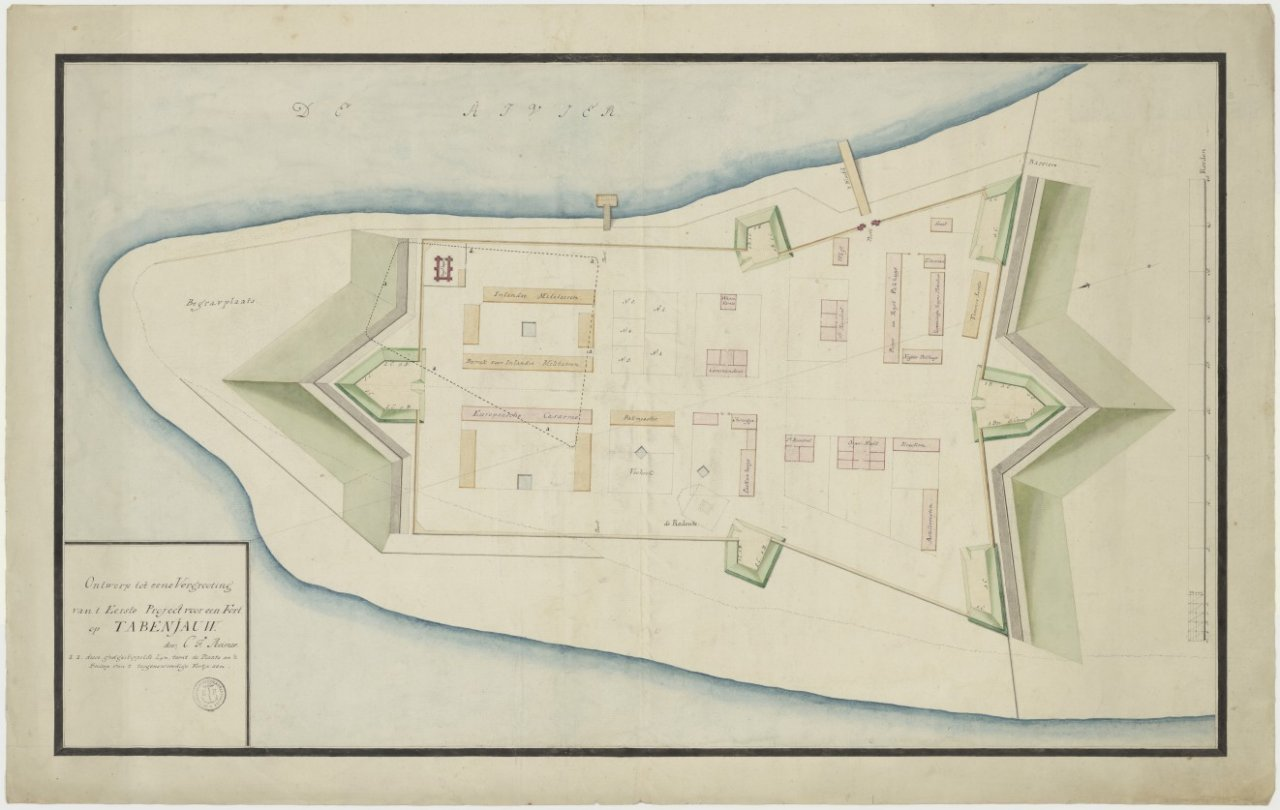 Desain untuk proyek perluasan pertama Benteng Tabanio